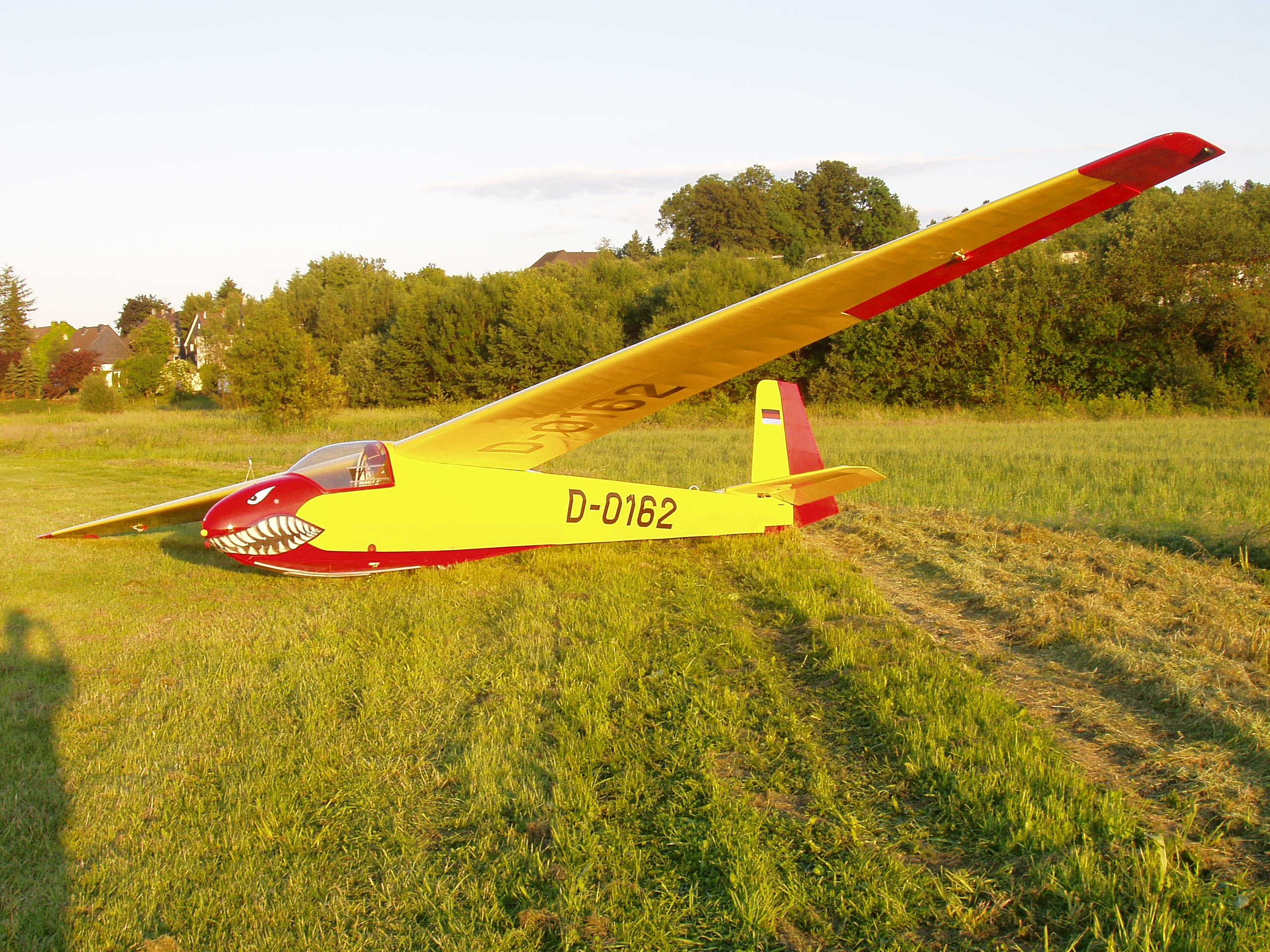 A Schleicher K 8 at the Airfield Wipperfuerth-Neye, Germany (EDKN).